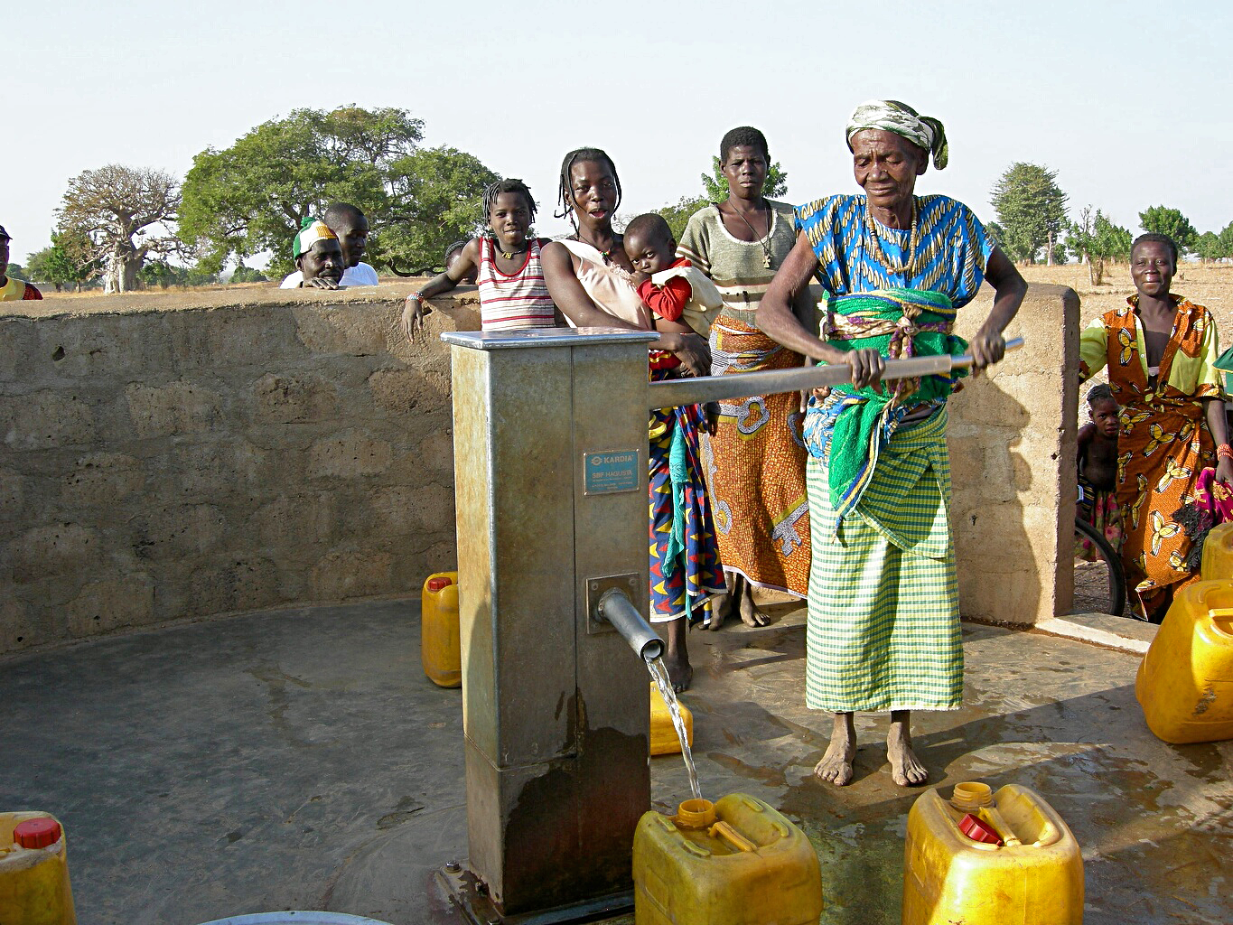 Burkina Faso: Handbetriebener Brunnen in Dourtenga